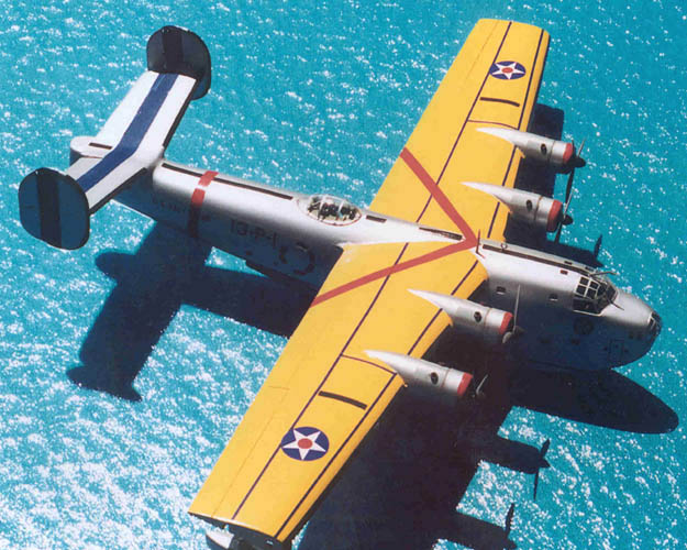 LundCoronado